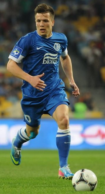 Євген Коноплянка - український футболіст ФК Дніпро